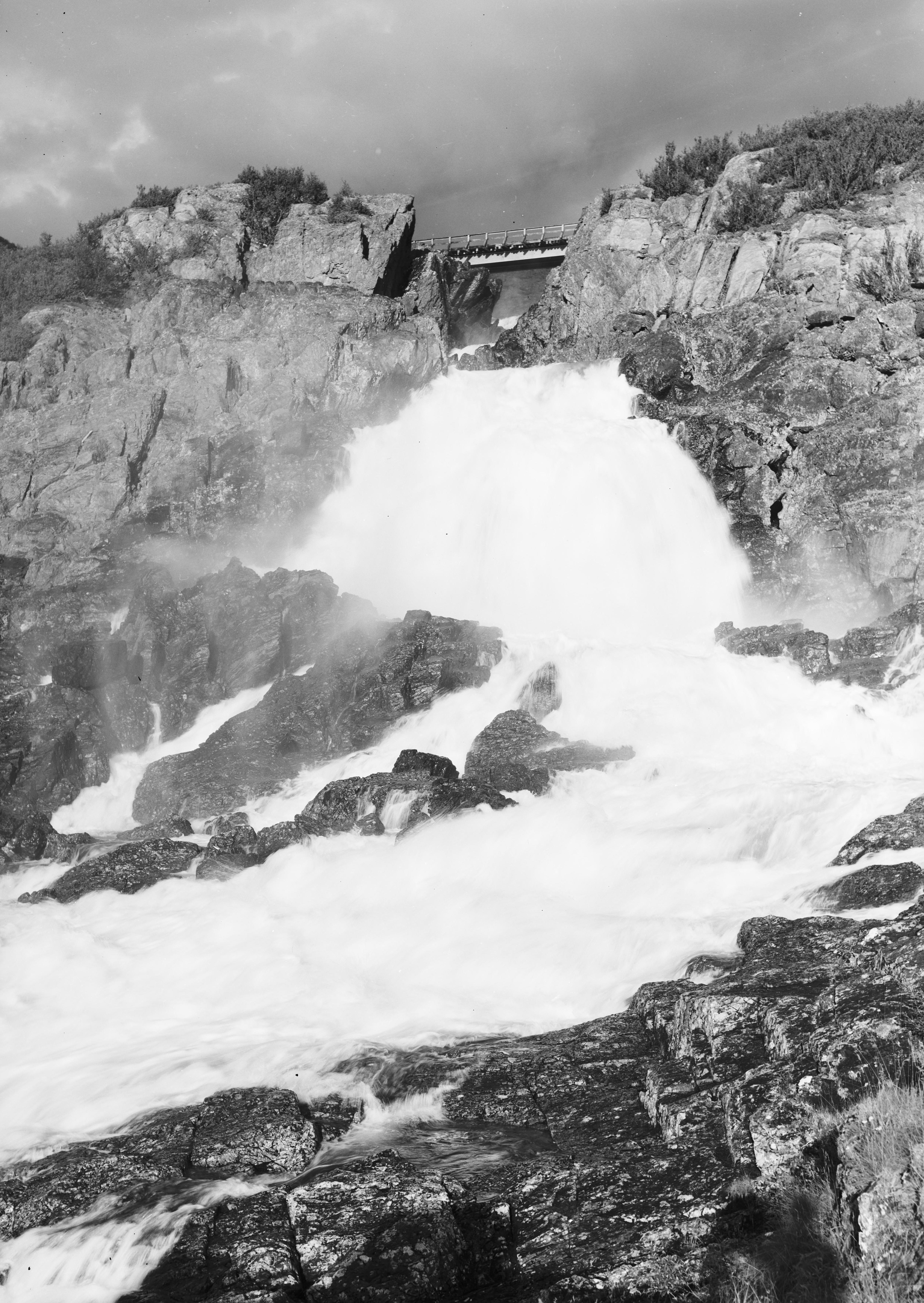 Bildet er hentet fra Nasjonalbibliotekets bildesamling. Anmerkninger til bildet var: fotograf ukjent. Adamsfjordfossen, Lebesby, Finnmark